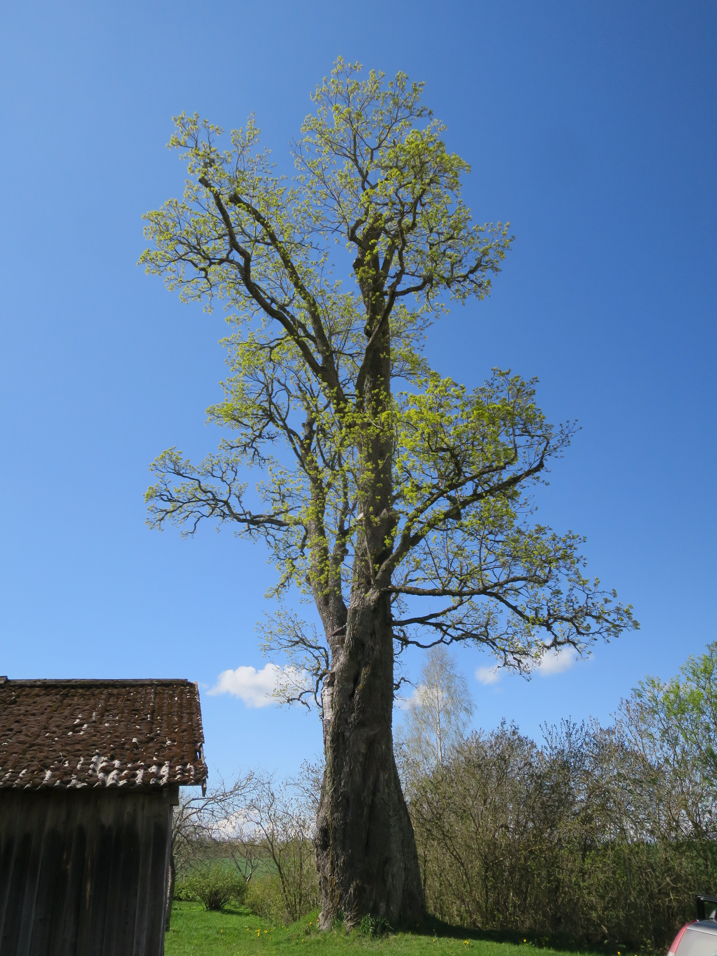 Rūtiņu kļava, 2020-05-04